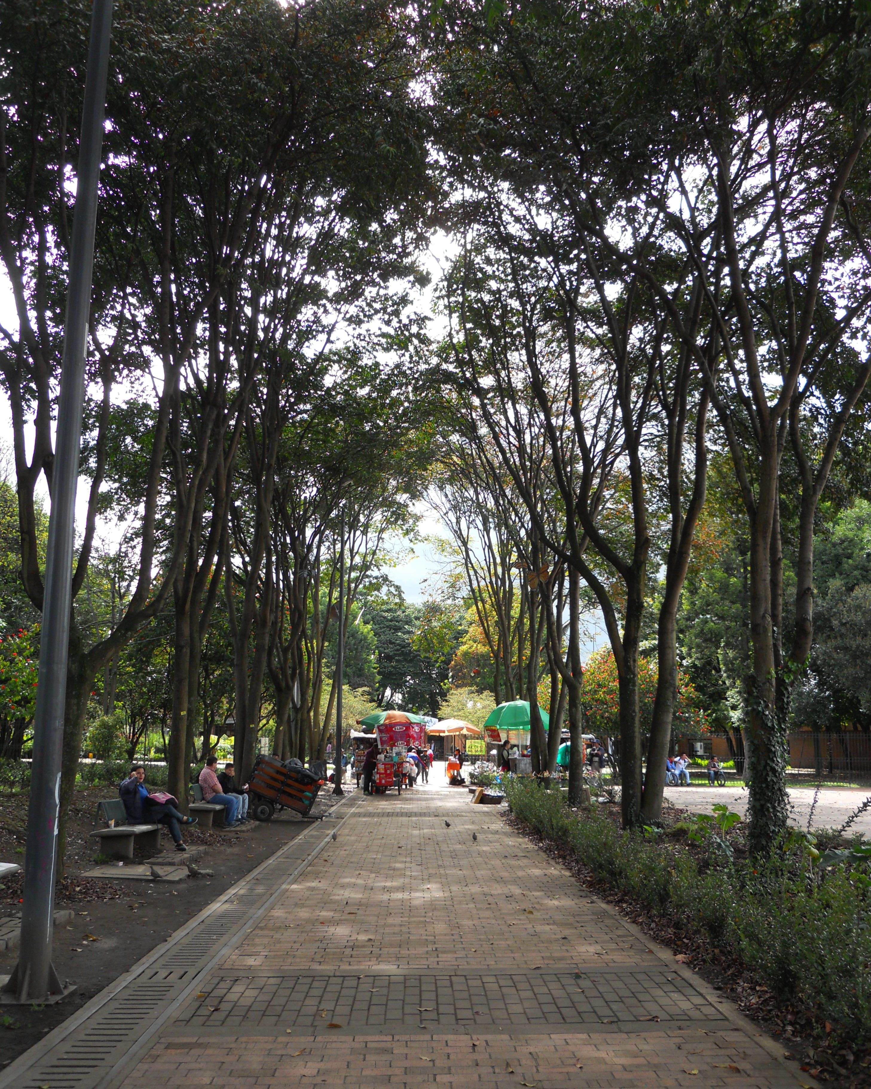 Acceso al Jardín Botánico de Bogotá por la calle 63.